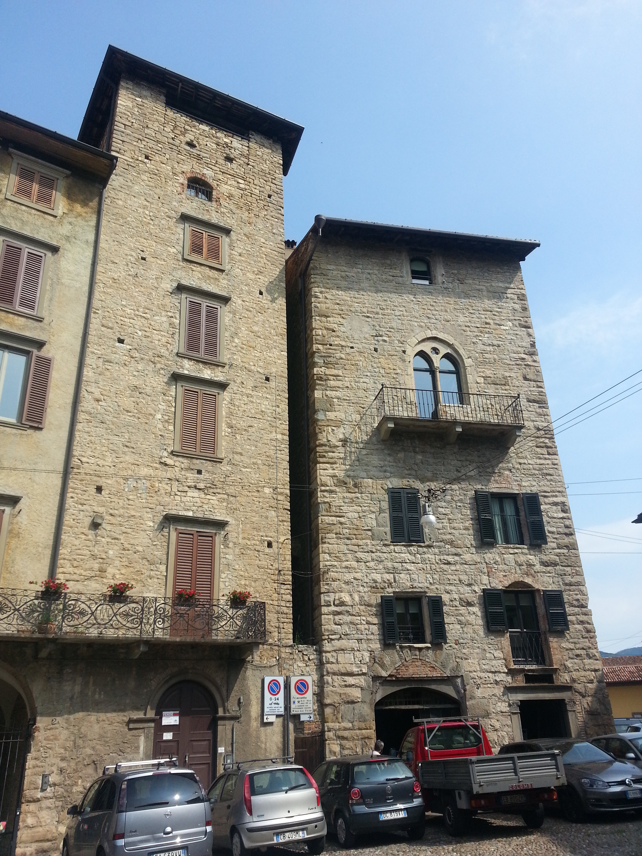 Piazza del fieno in Bergamo, città alta, con case torre